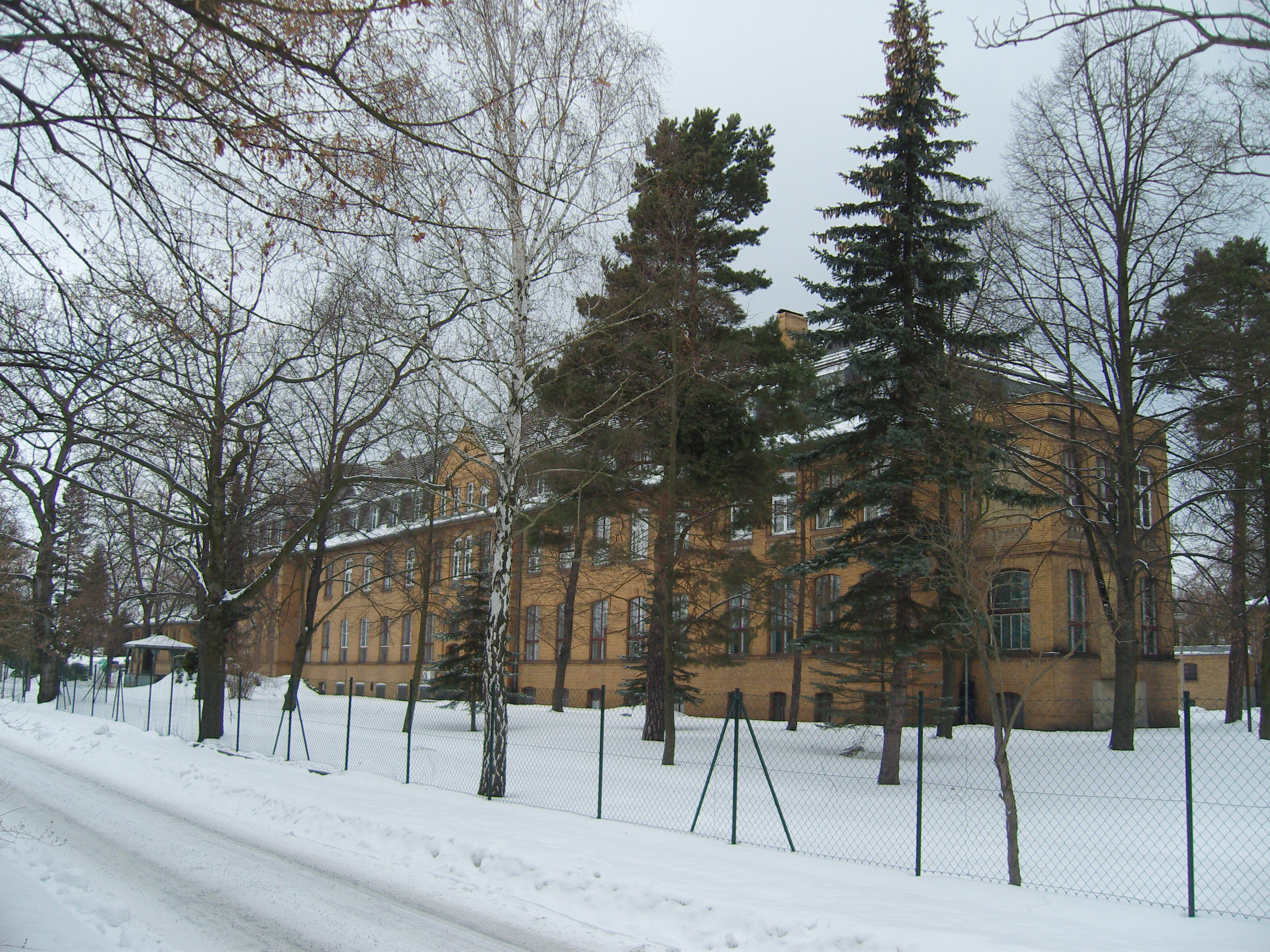 Krankenhaus in Klettwitz - Baudenkmal